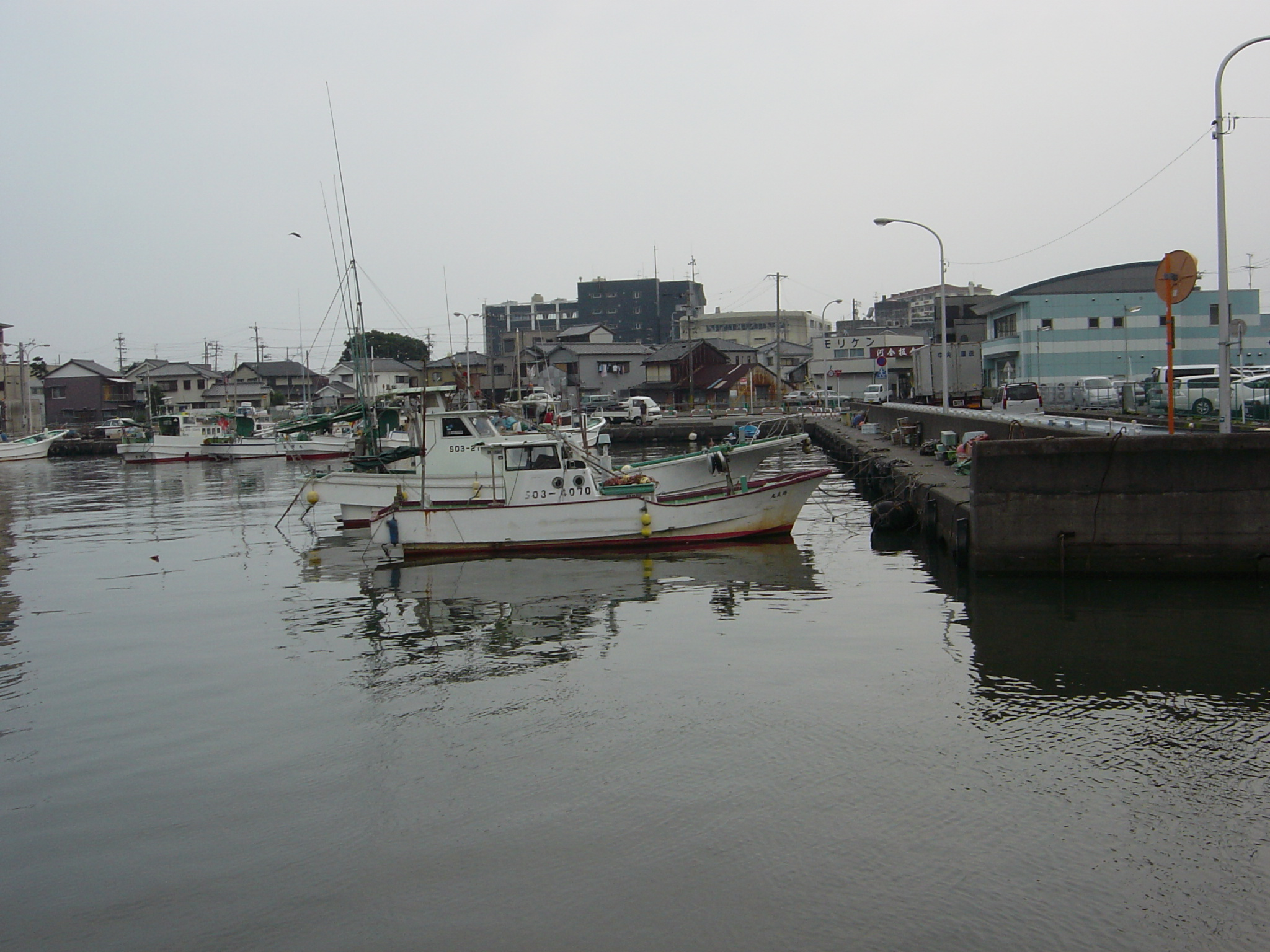 焼津港